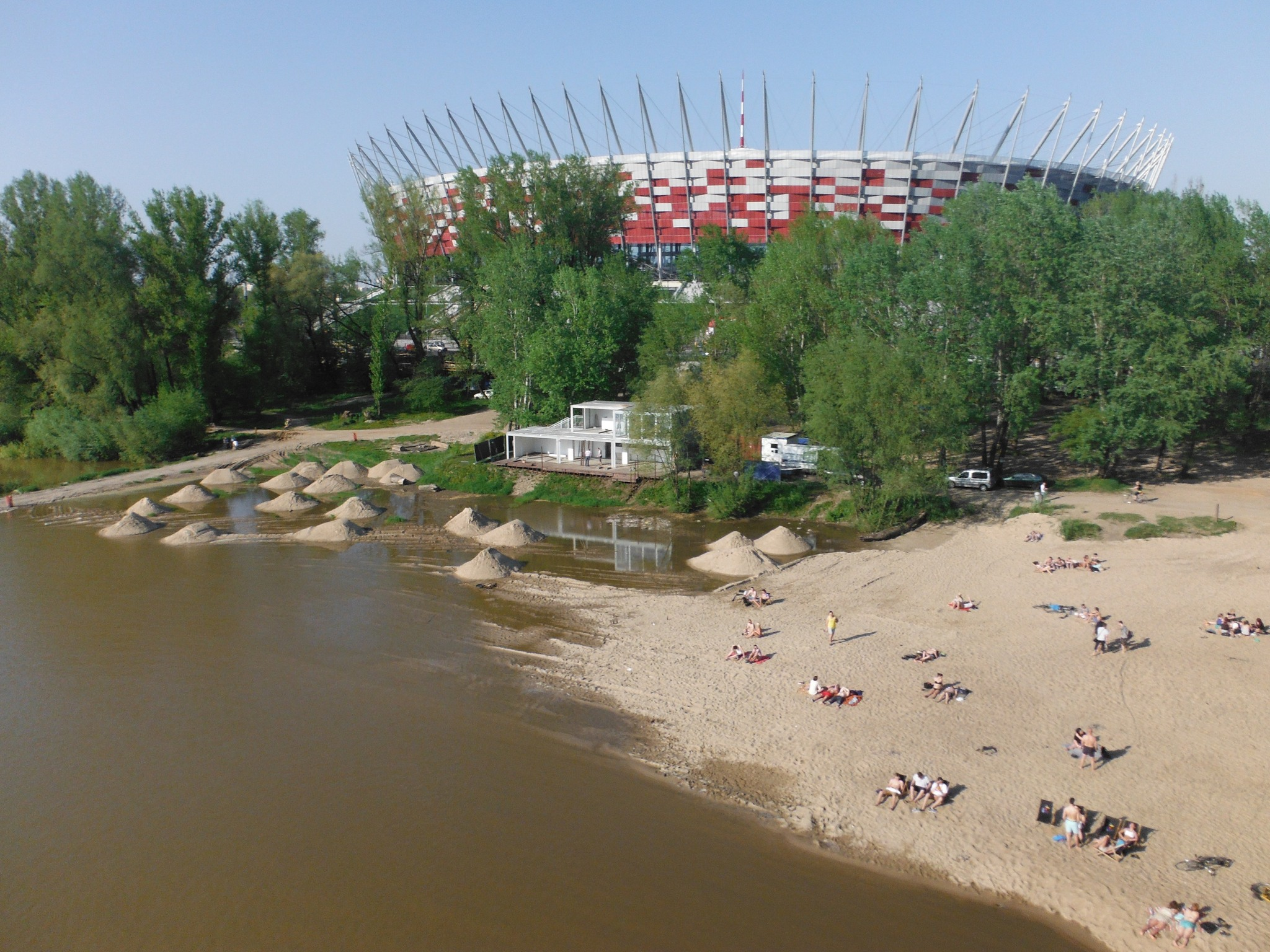 Plaża przy Moście Poniatowskiego w Warszawie. W tle Stadion Narodowy.